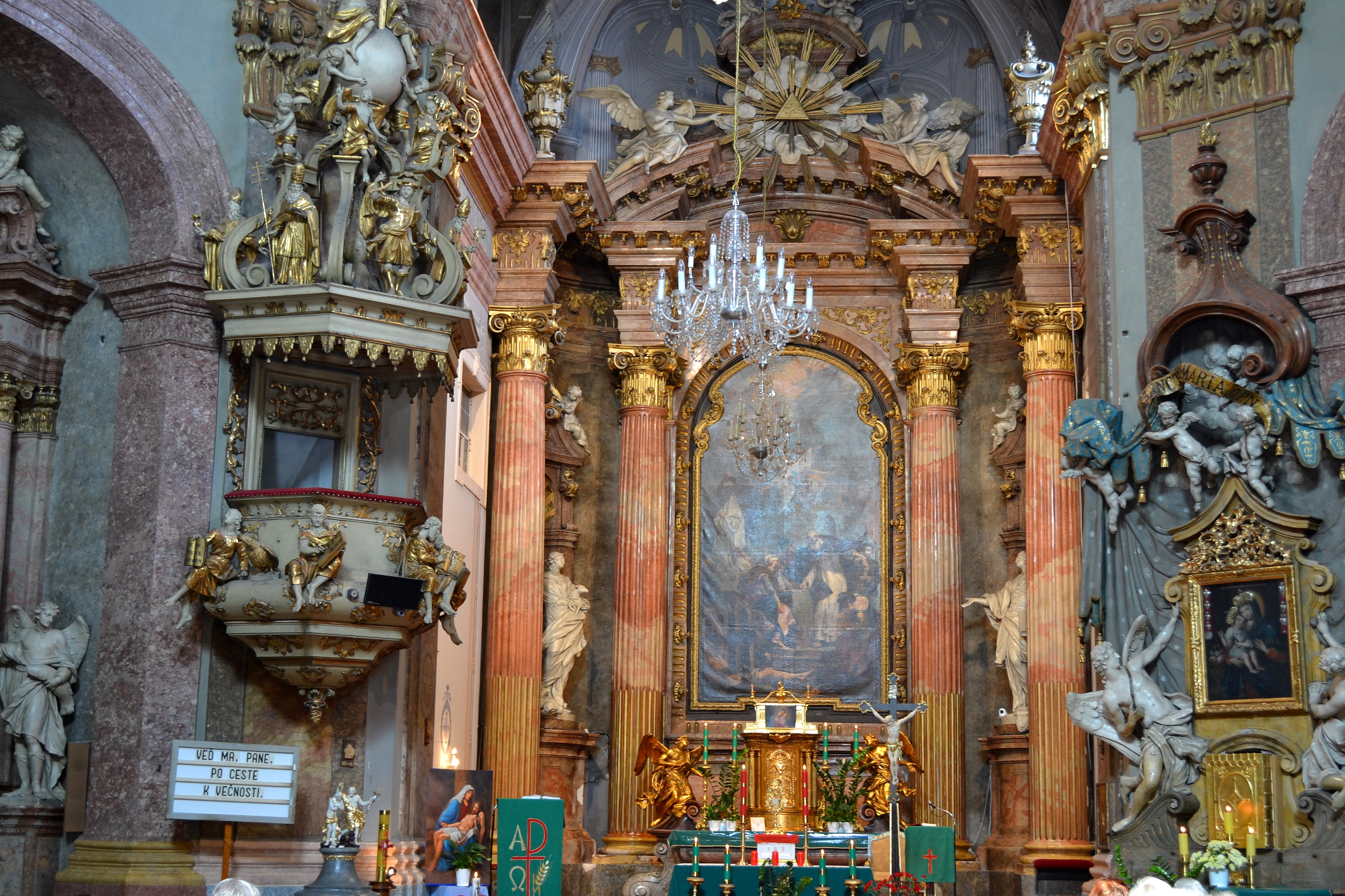 Pohľad do presbytéria s hlavným oltárom